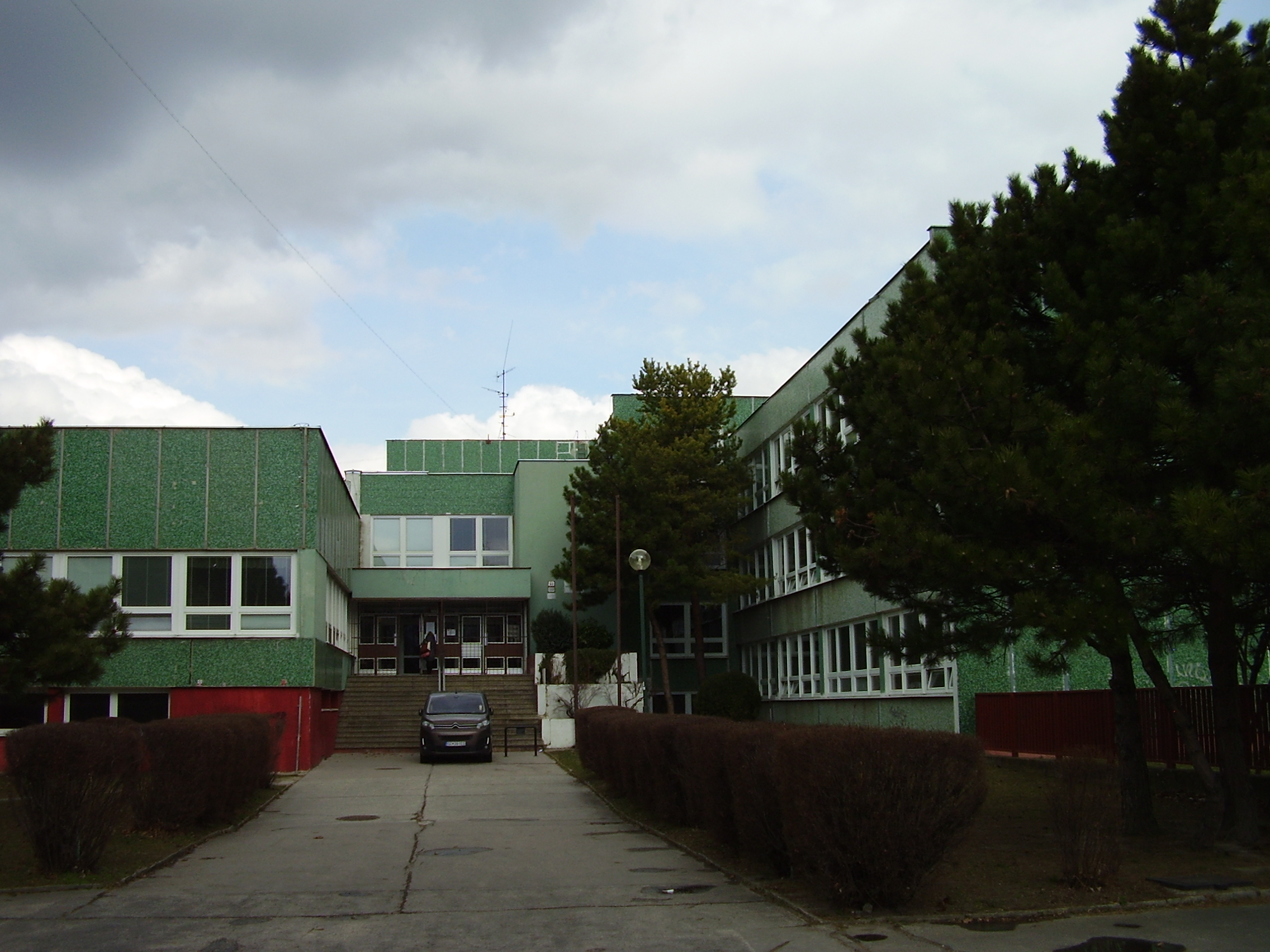 Elementary school Budatínska 61, Petržalka, Bratislava, Slovakia